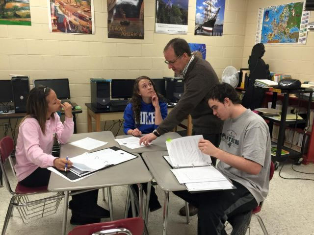 Schülerinnen und Schüler des BBZ beim Austausch in den USA